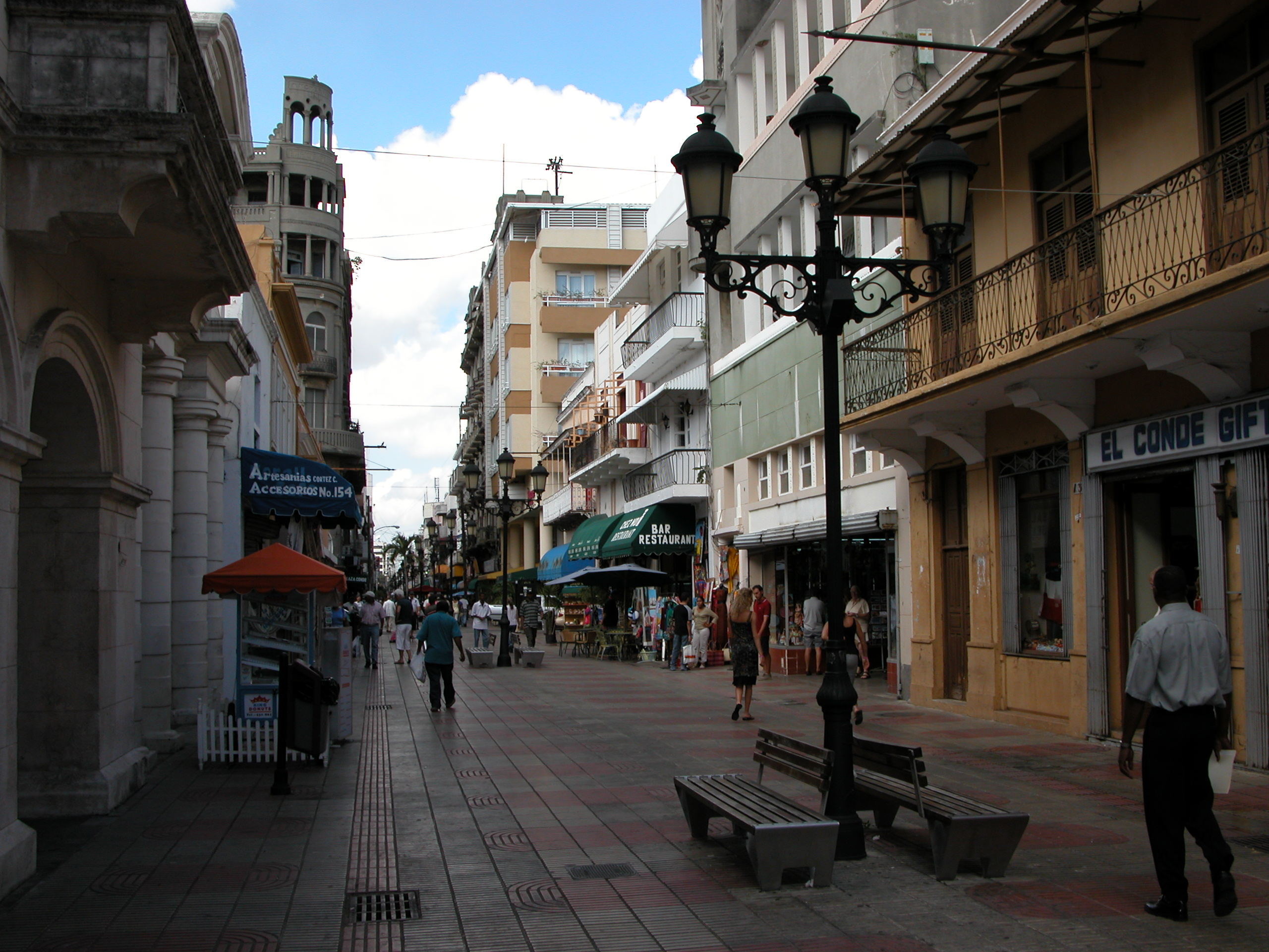 Conde